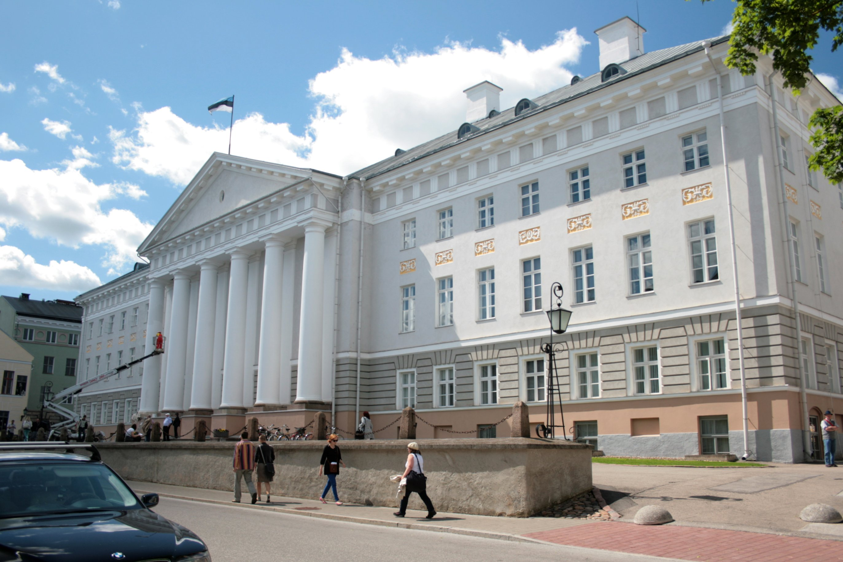 The University of Tartu was founded in 1632 by the Swedish king Gustavus Adolphus. The main building's opening ceremony took place on 31 July 1809. The fasade of the main building has a simple and austere outline, appearing both majestic and elegant.